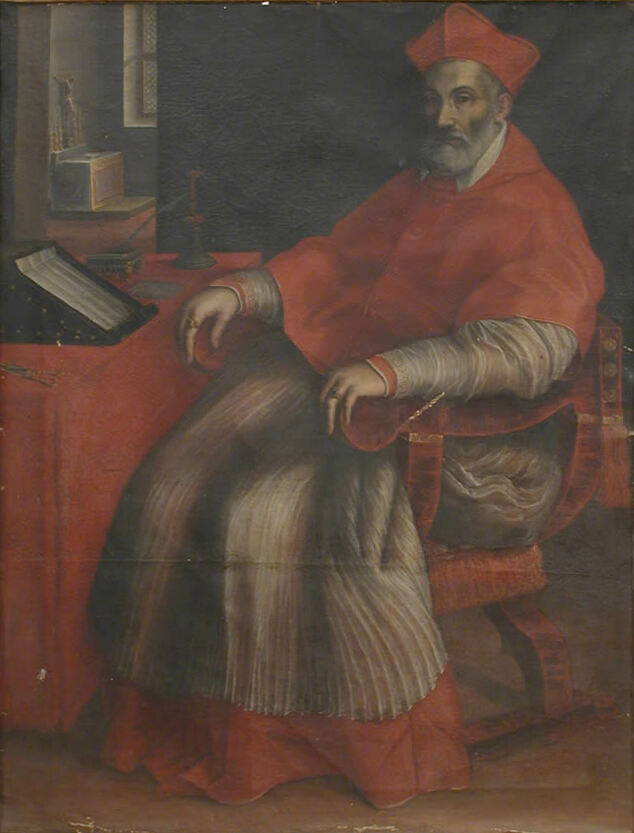 Retrato del cardenal Gabriele Paleotti, óleo sobre lienzo, 150 x 115 cm, Bolonia, Archivio Storico dell’Università degli Studi